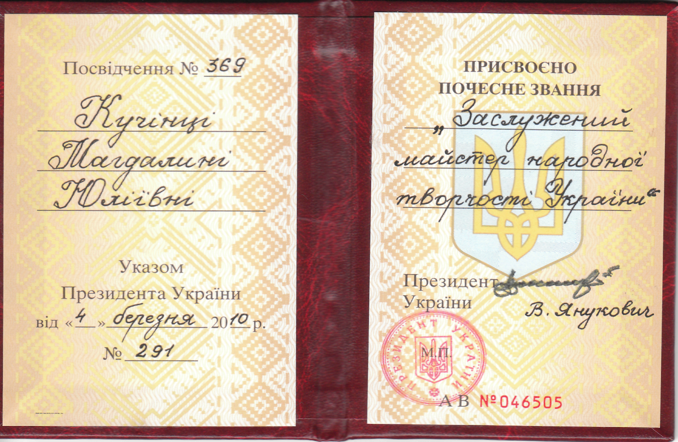 Посвідчення Магдалини Кучінки